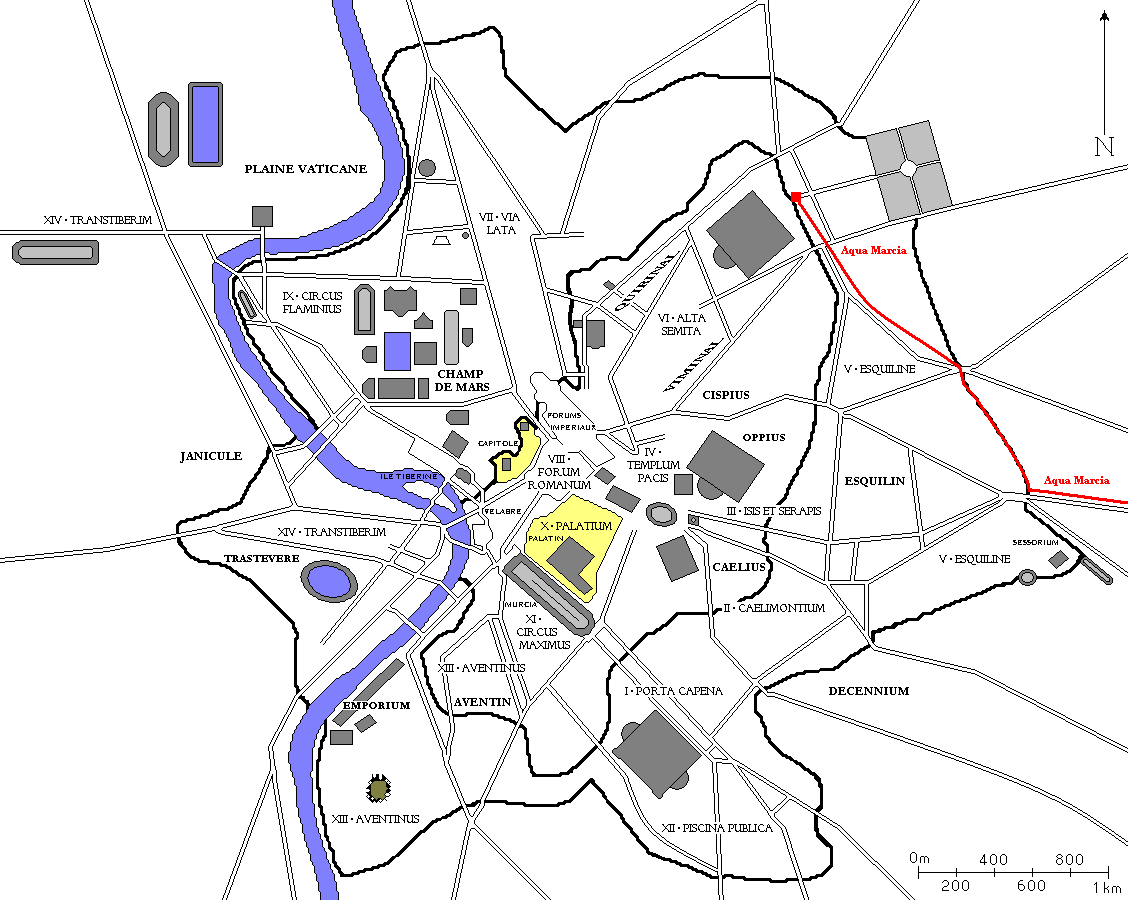 Plan de Rome avec l'aqua Marcia en rouge.